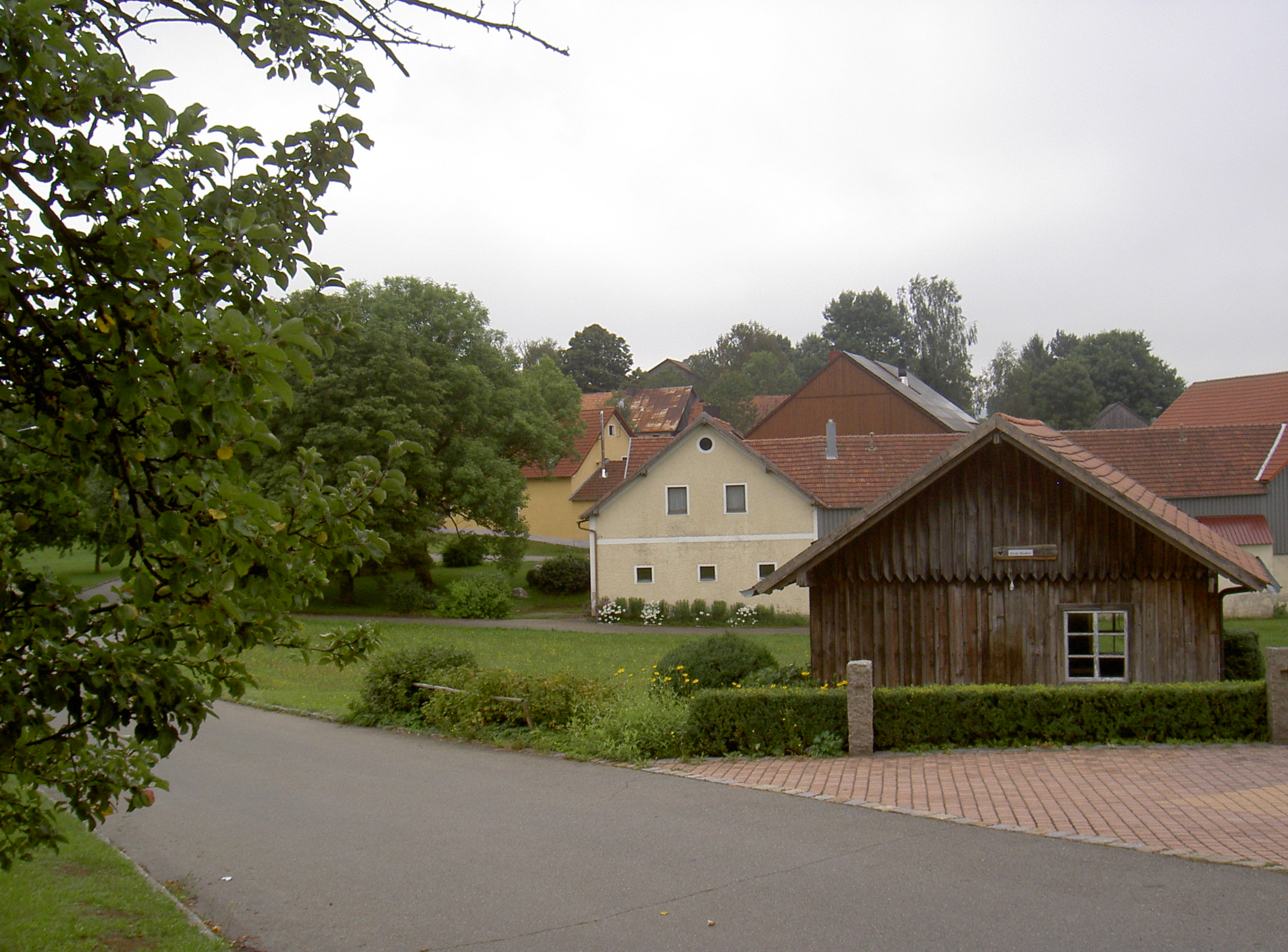 Kößing